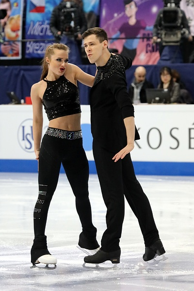 Анастасия Галета / Авидан Браун (Азербайджан) на чемпионате мира 2017